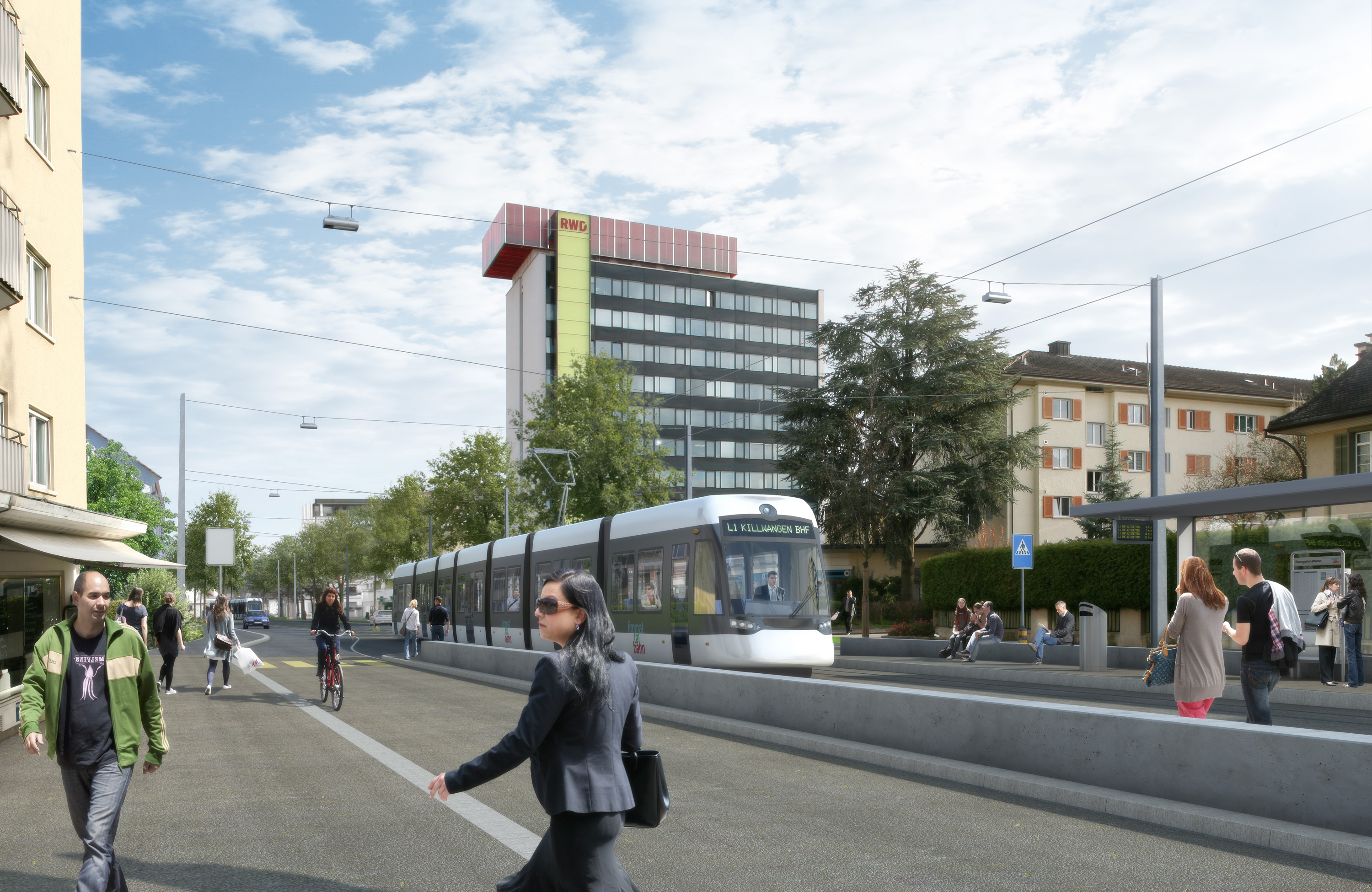 Visualisierung Limmattalbahn Stand 2011